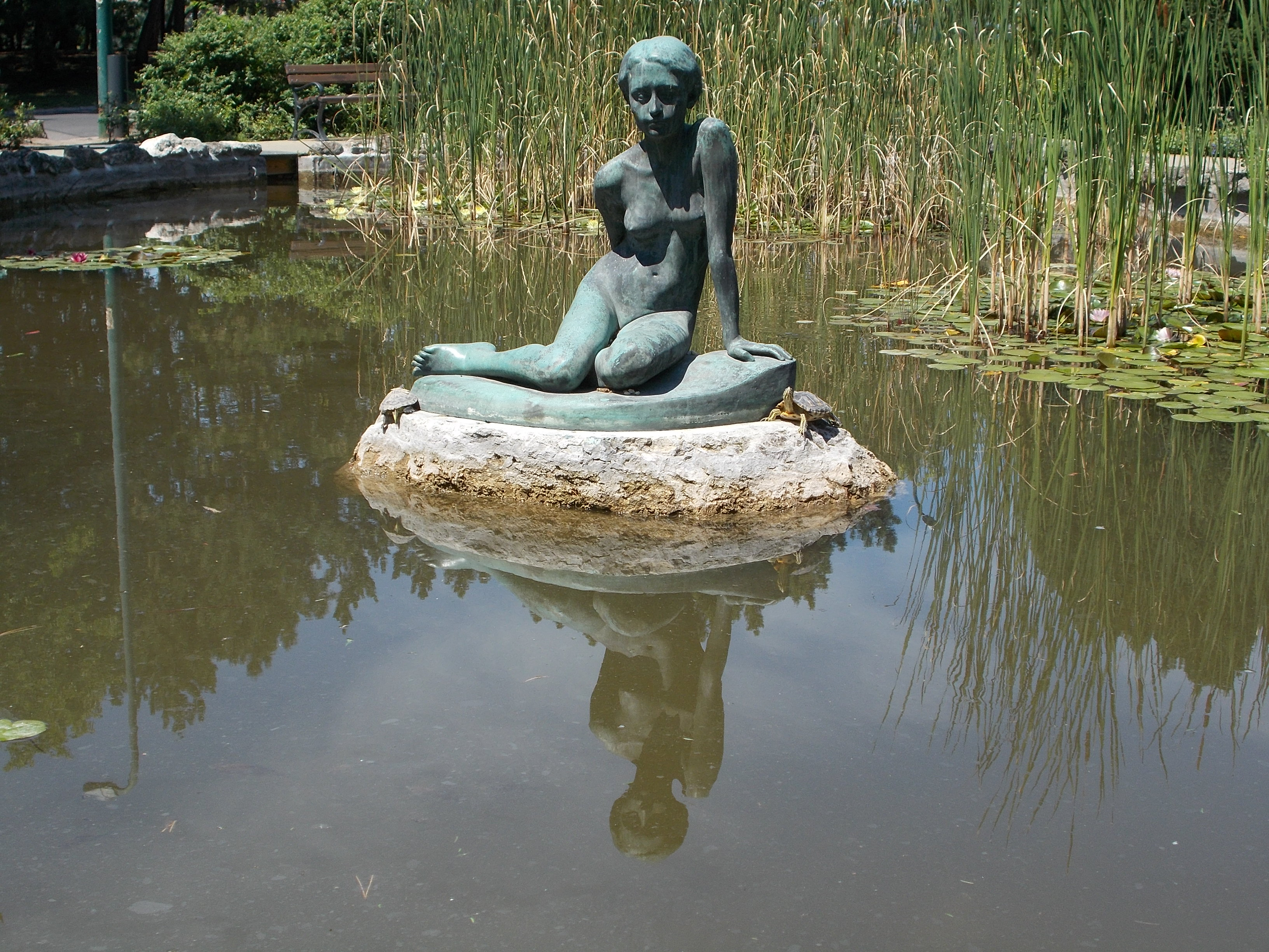 Ülő akt lány szobra (Csikász Imre műve, 1932) a Japánkertben. kozterkep.hu - Magyarország, Budapest, Margitsziget